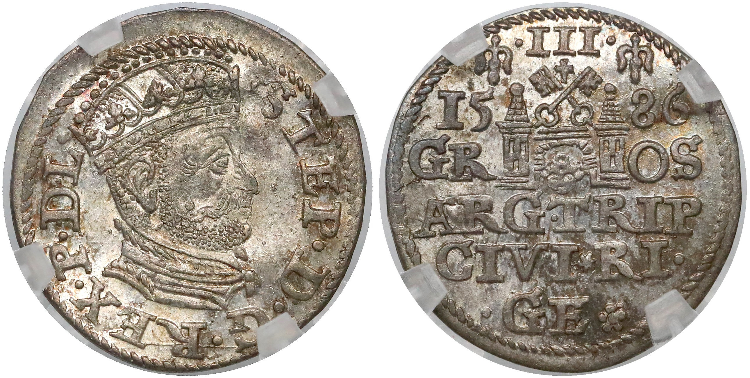 Naśladownictwo trojak 1586 Ryga